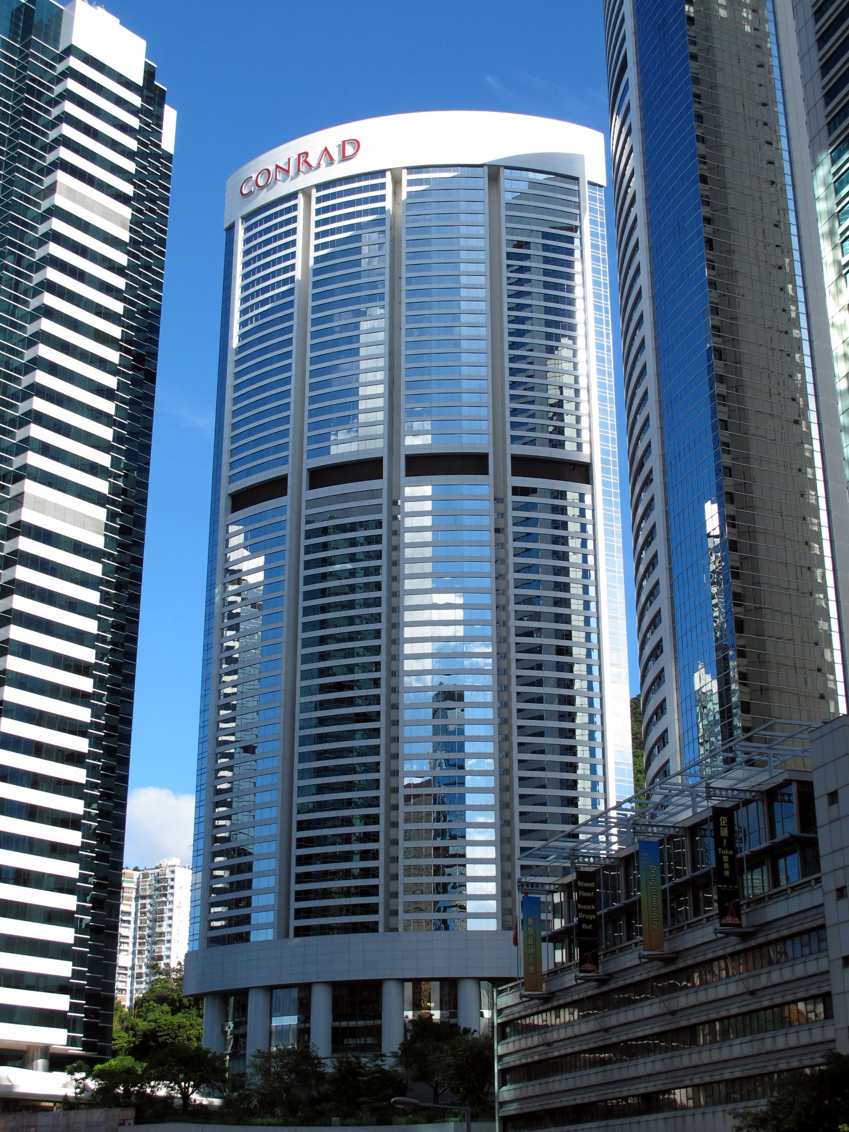 Conrad Hong Kong